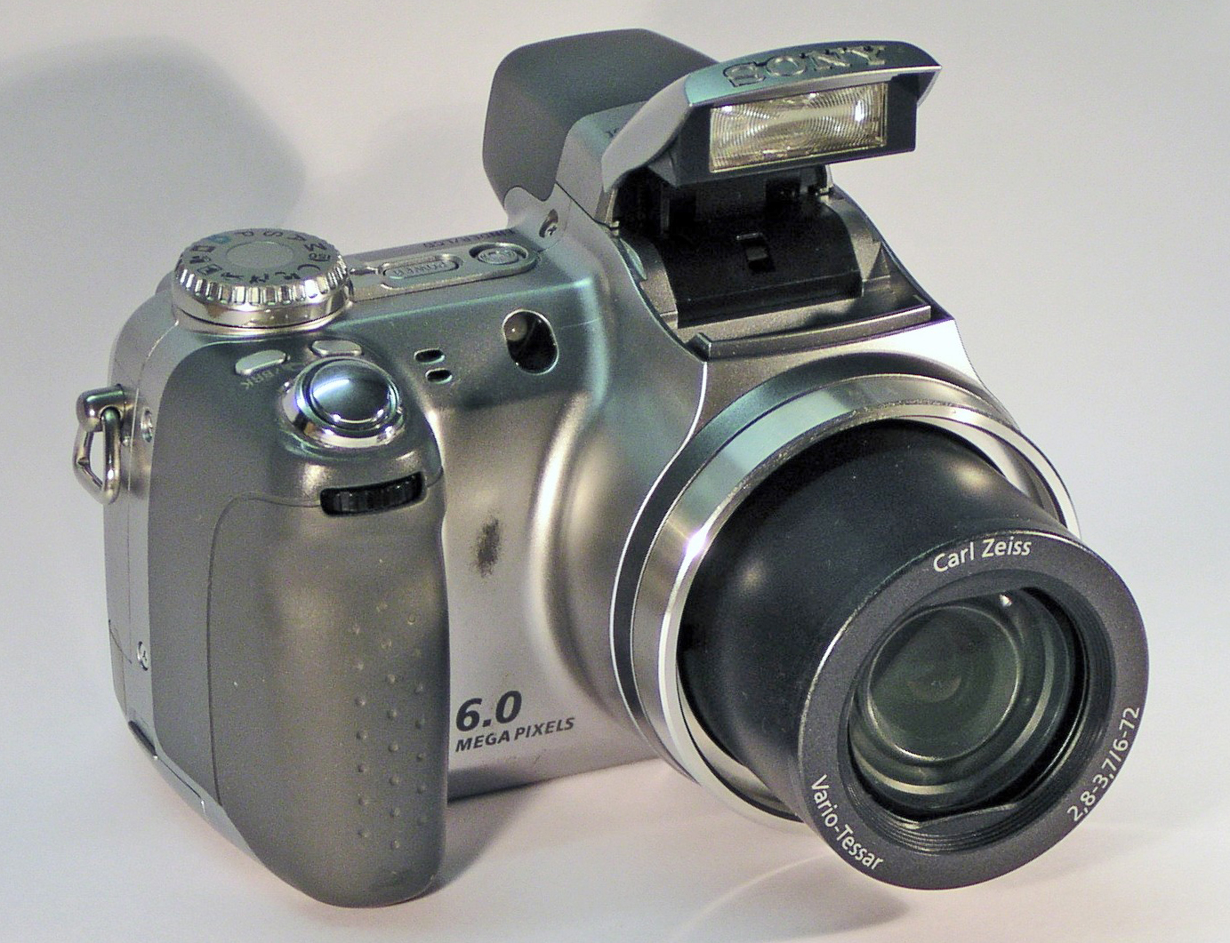 Digital camera Sony DSC-H2.